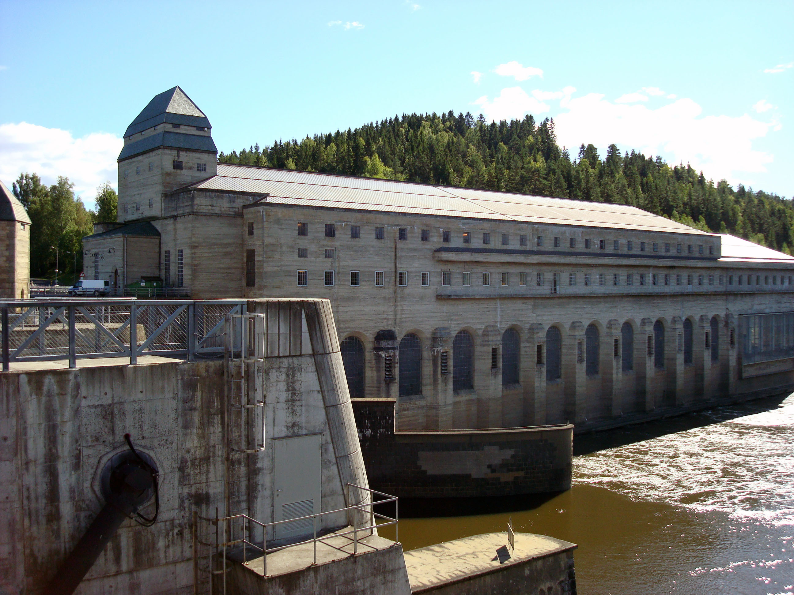 Solbergfoss I, bygget i 1924. Dato: 2010